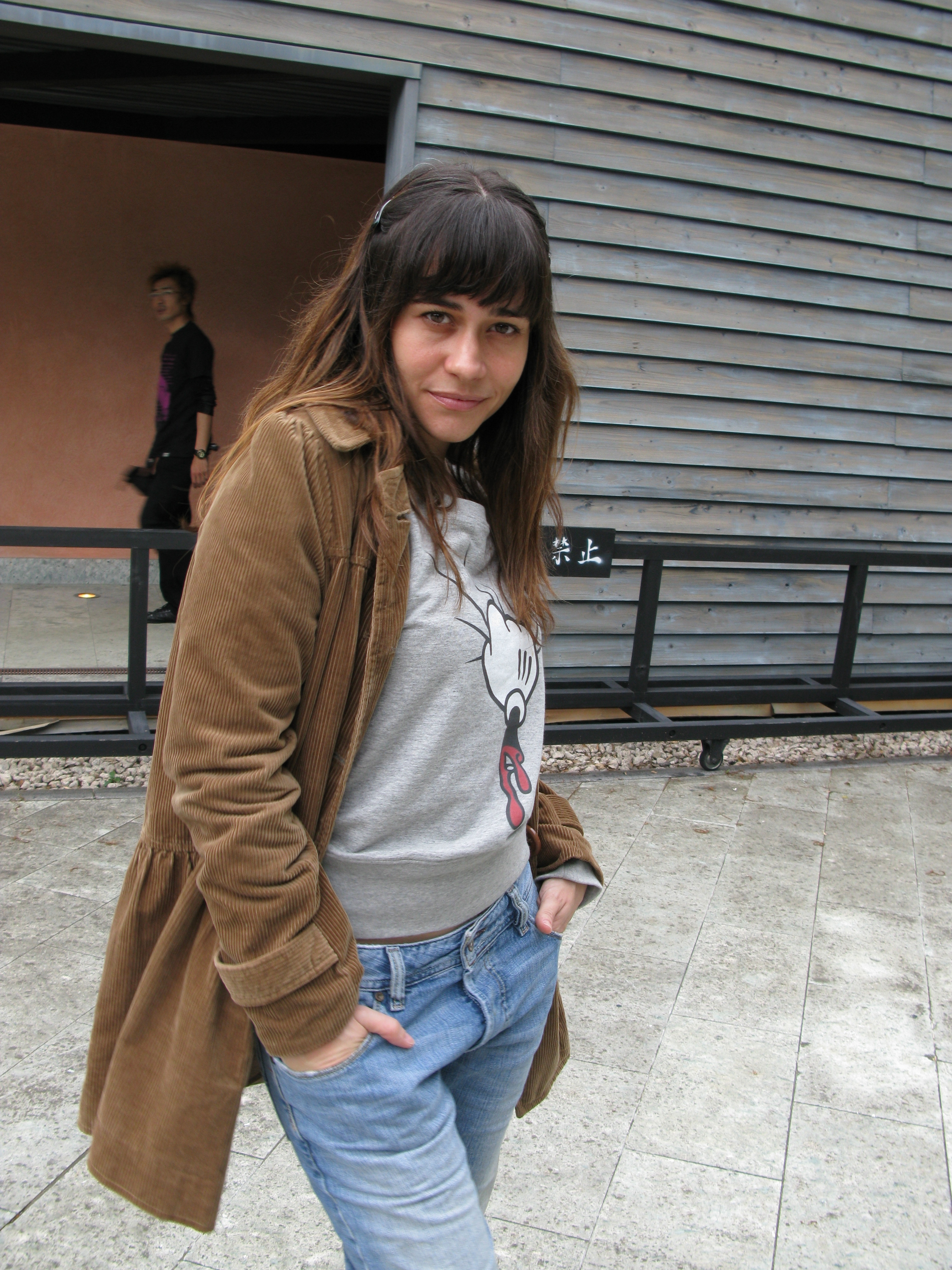 Alessandra Negrini